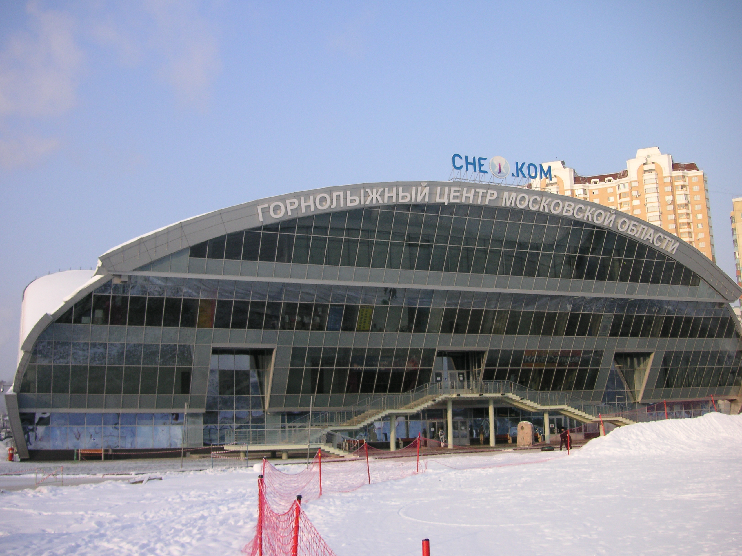 Горнолыжный комлекс Снеж.ком в микрорайоне «Павшинская пойма». Красногорск, Московская область